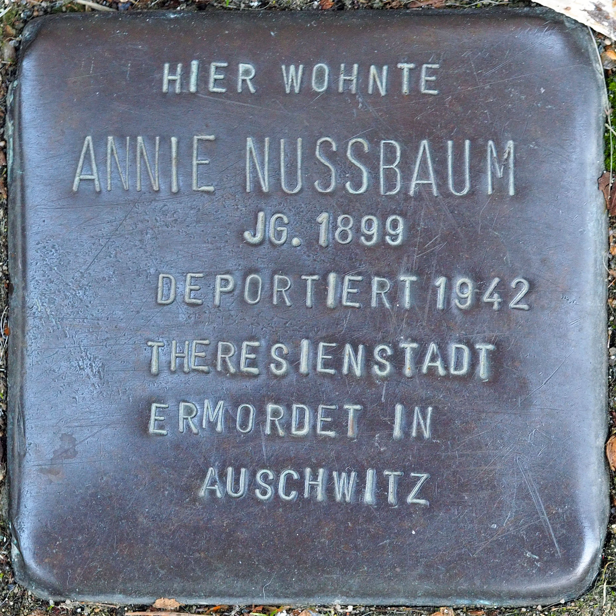 Stolperstein VIE: Nussbaum, Annie